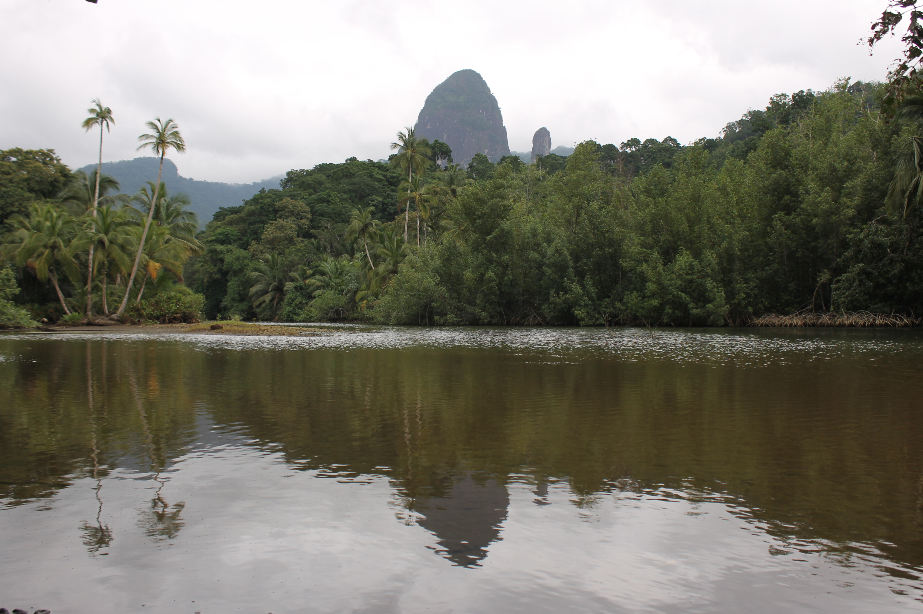 Praia Caixao This is an image of the Biosphere Reserve: Island of Príncipe Biosphere Reserve